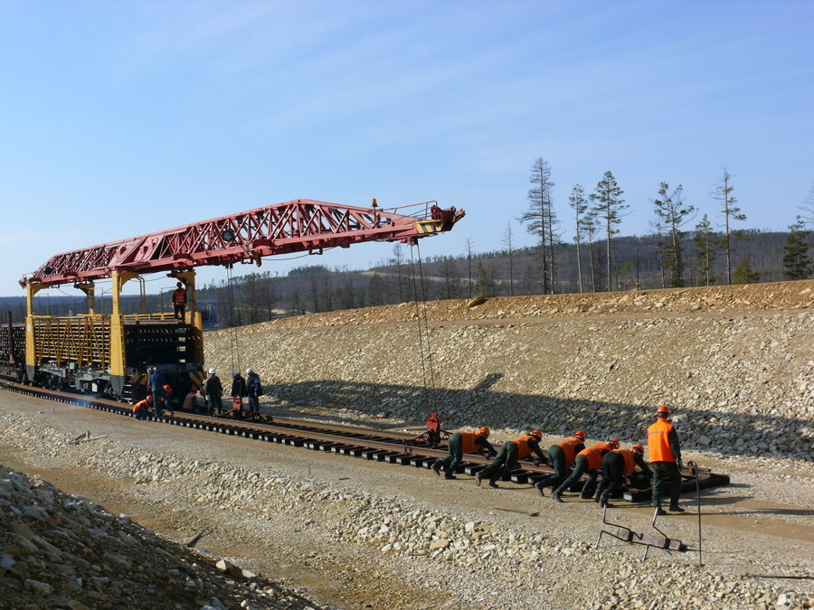 Рельсоукладочный поезд на АЯМе, участок Томмот - Кердем